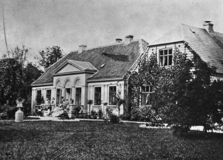 Sankt Thomas Ejendom tilhørende apoteker A. H. Riise